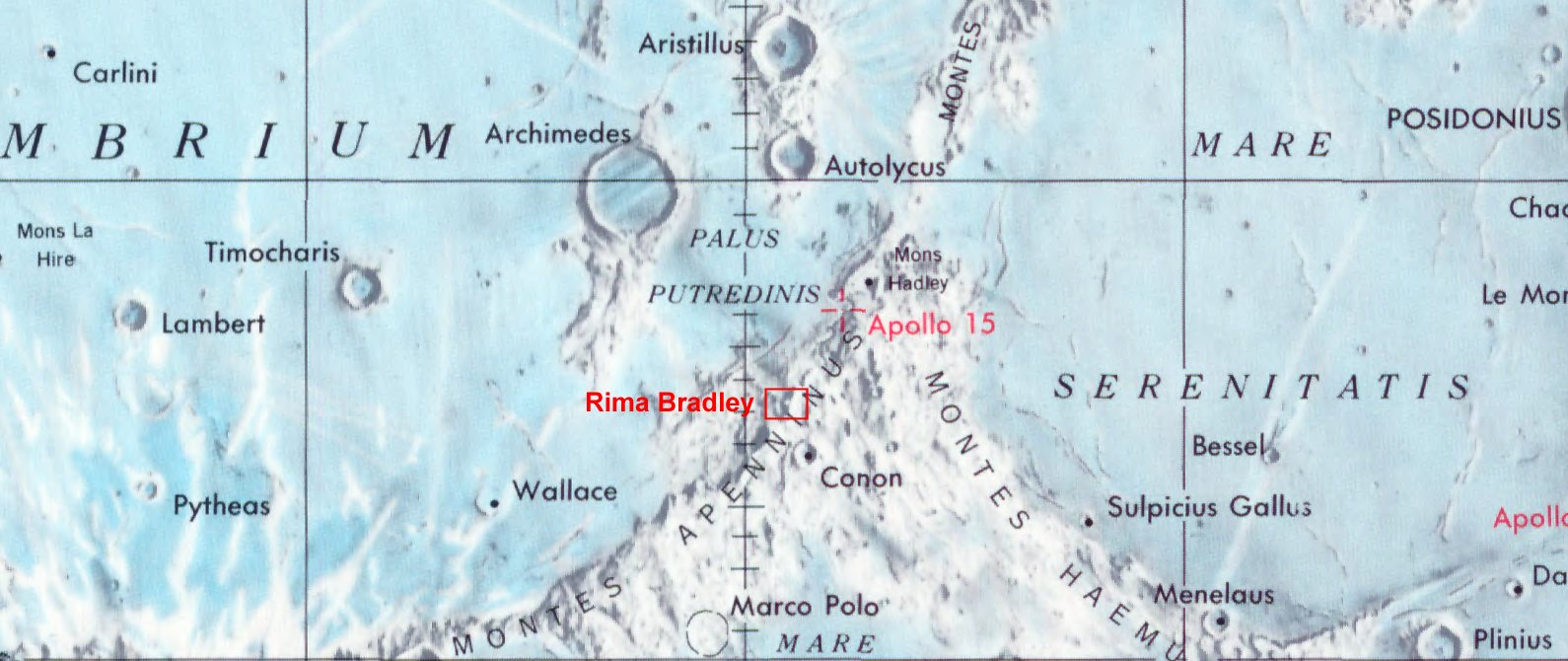 Rima Bradley. Localización. (Lunar Chart LPC1. Second Edition)